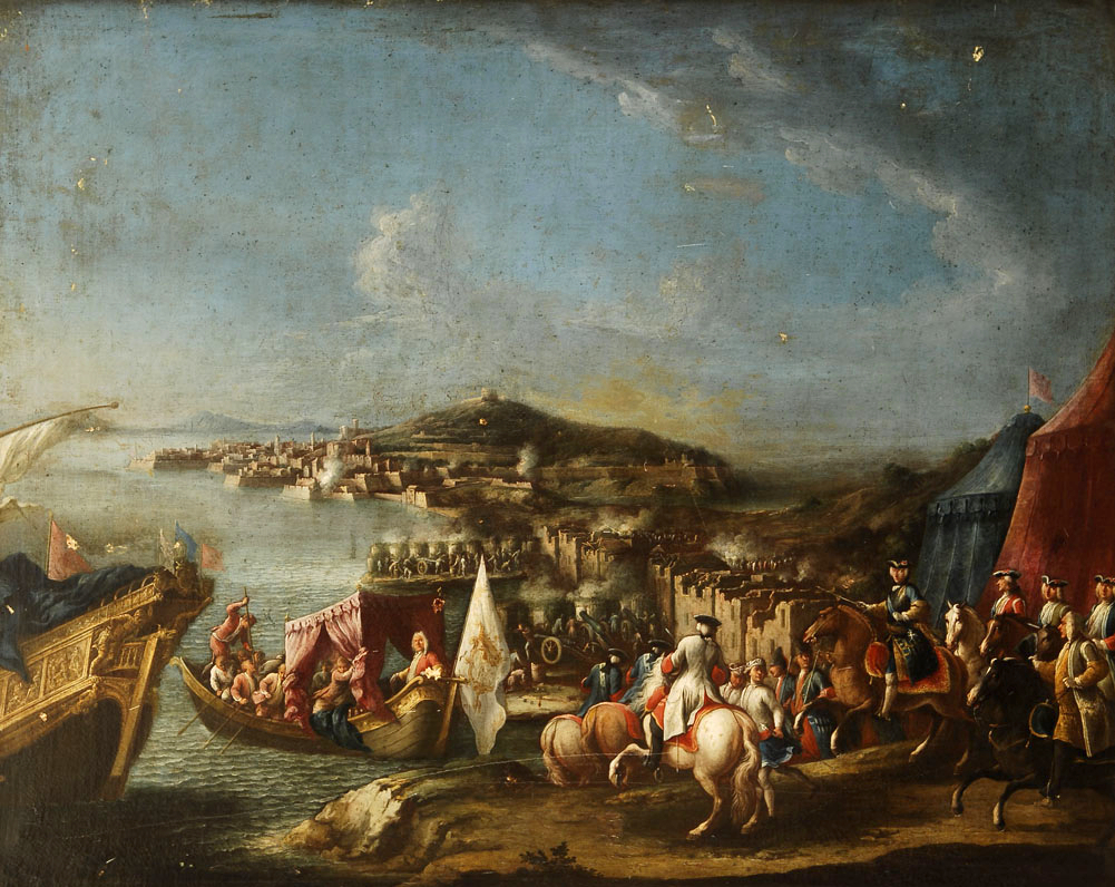 Il quadro mostra probabilmente la conquista di Gaeta da parte del re Carlo III di Borbone nel 1734.